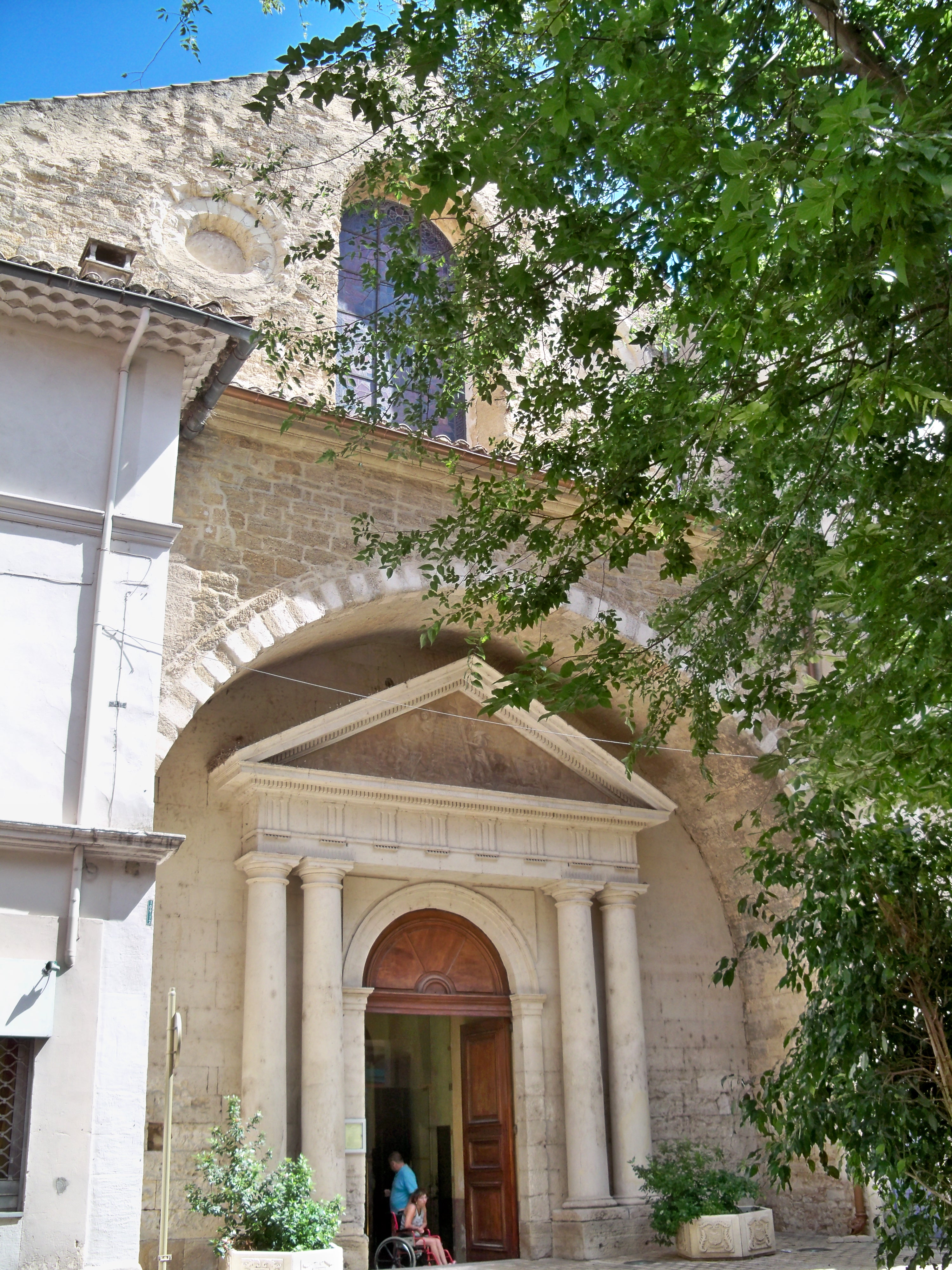 Facade de Notre Dame de Nazareth, à Orange, Vaucluse, France